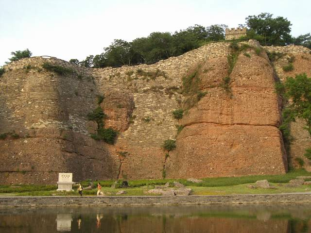 石頭城 2004年撮影 撮影者:権作中文（中国大陆）: 参照：